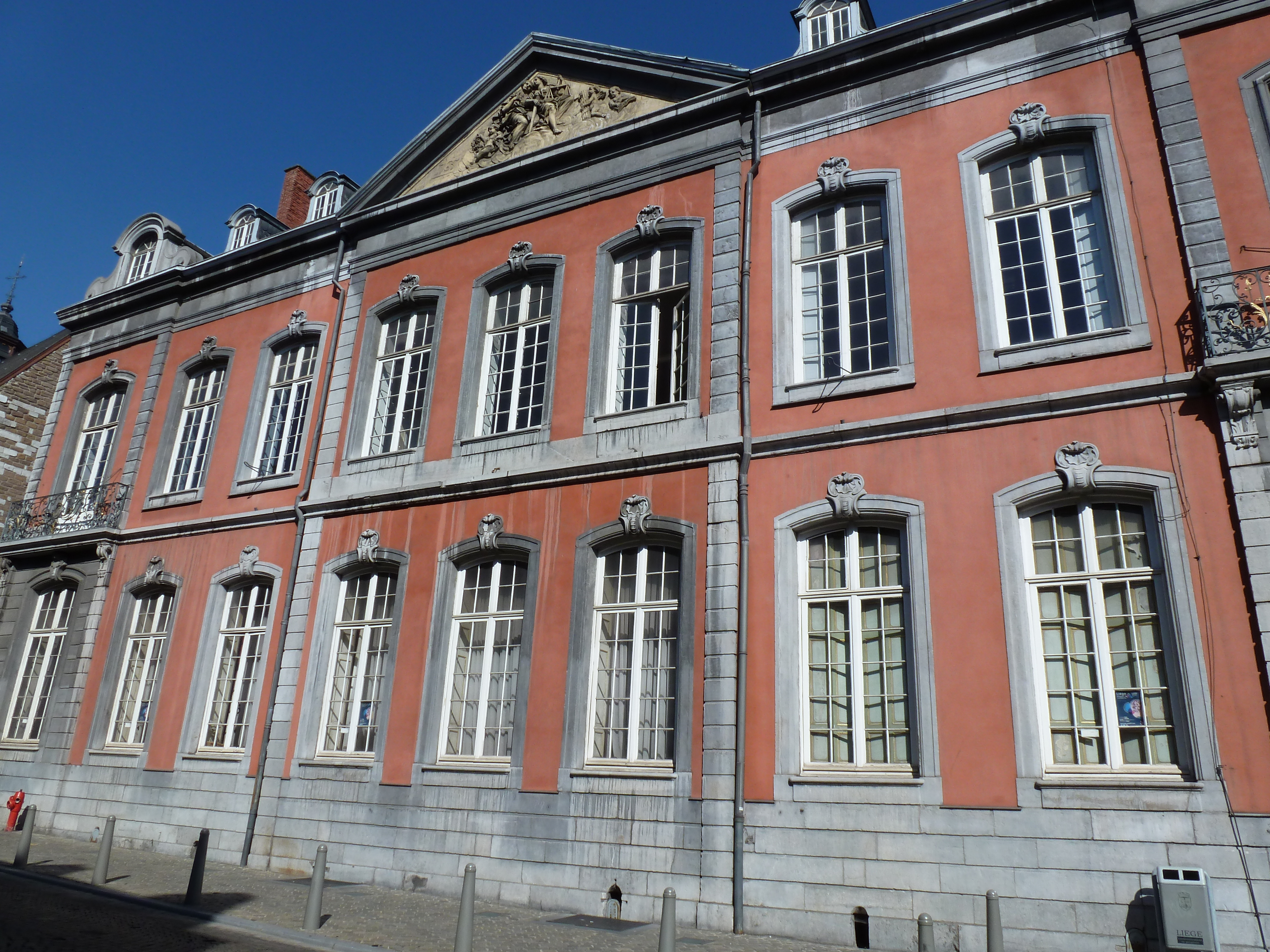 maison ancienne aussi dénommé Hôtel Sklins - actuellement Ecole d'Hôtellerie